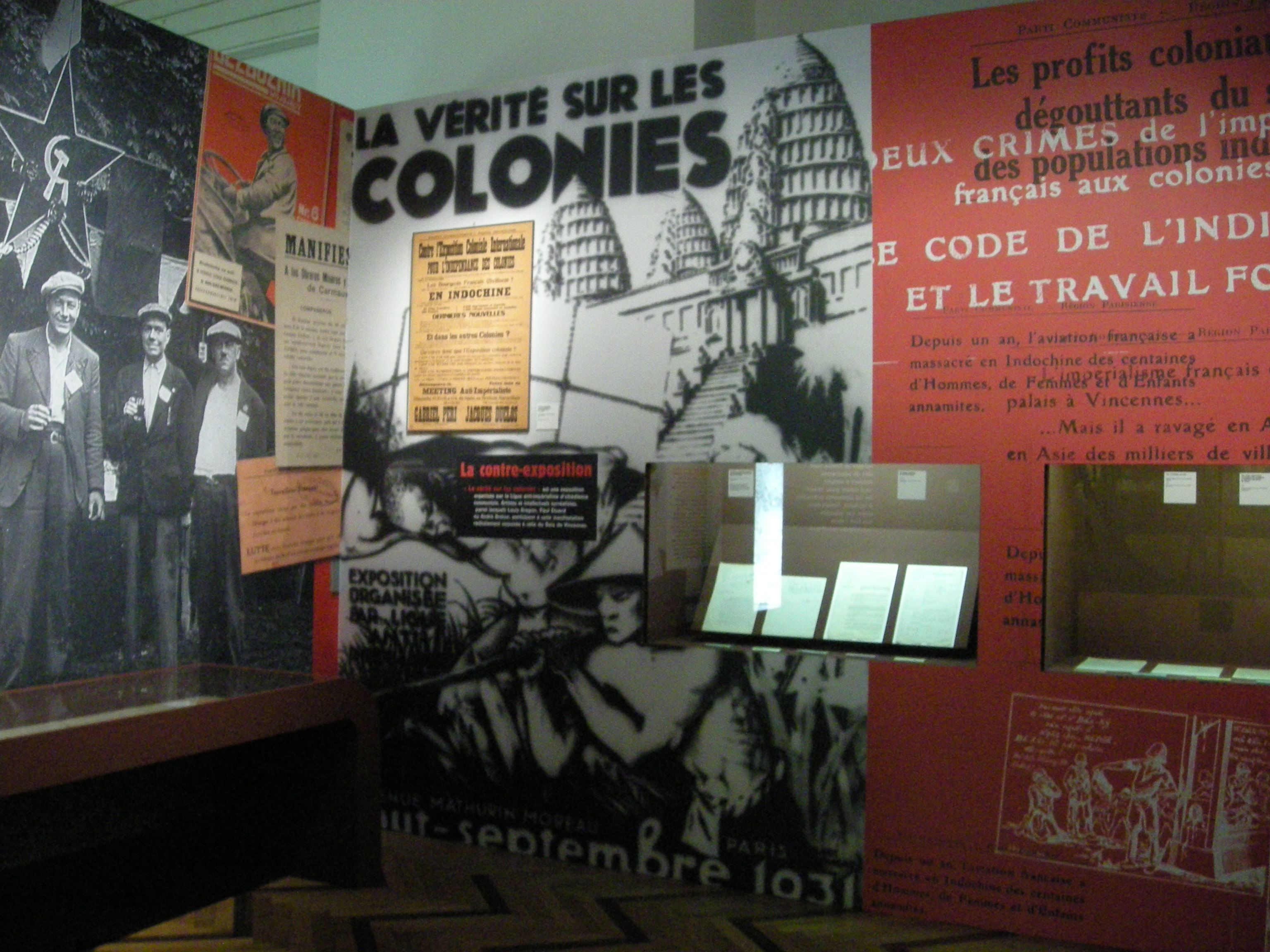 Exposition temporaire à la Cité nationale de l'histoire de l'immigration à Paris